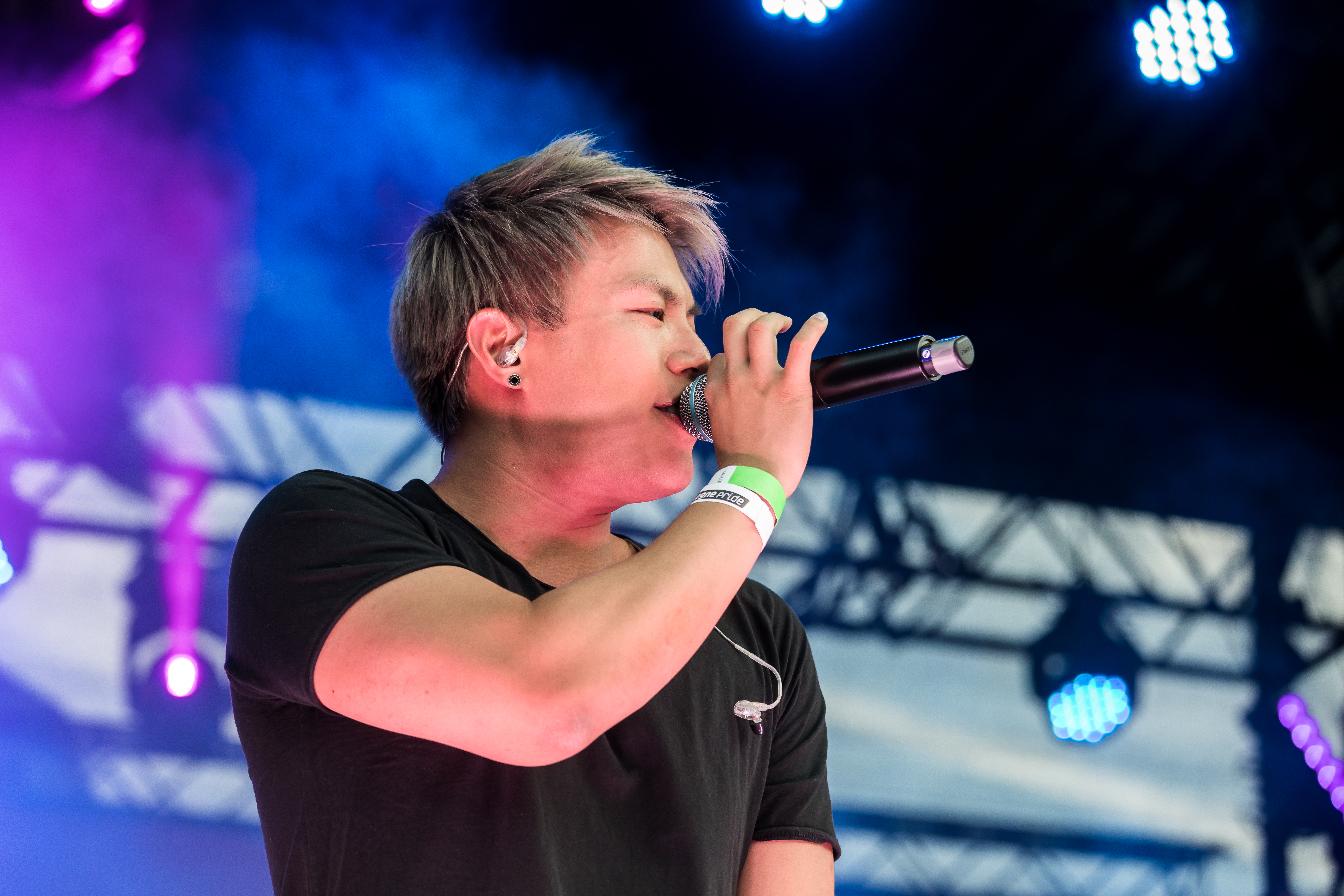 ColognePride/CSD 2018 - Auftritt von Jay Oh auf der Hauptbühne, Heumarkt